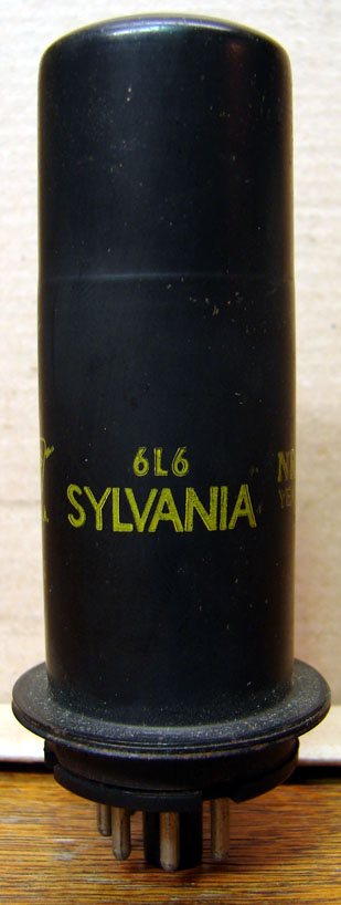 Sylvania Elektronenröhre 6L6 - in der ursprünglichen Ausführung als Stahlröhre